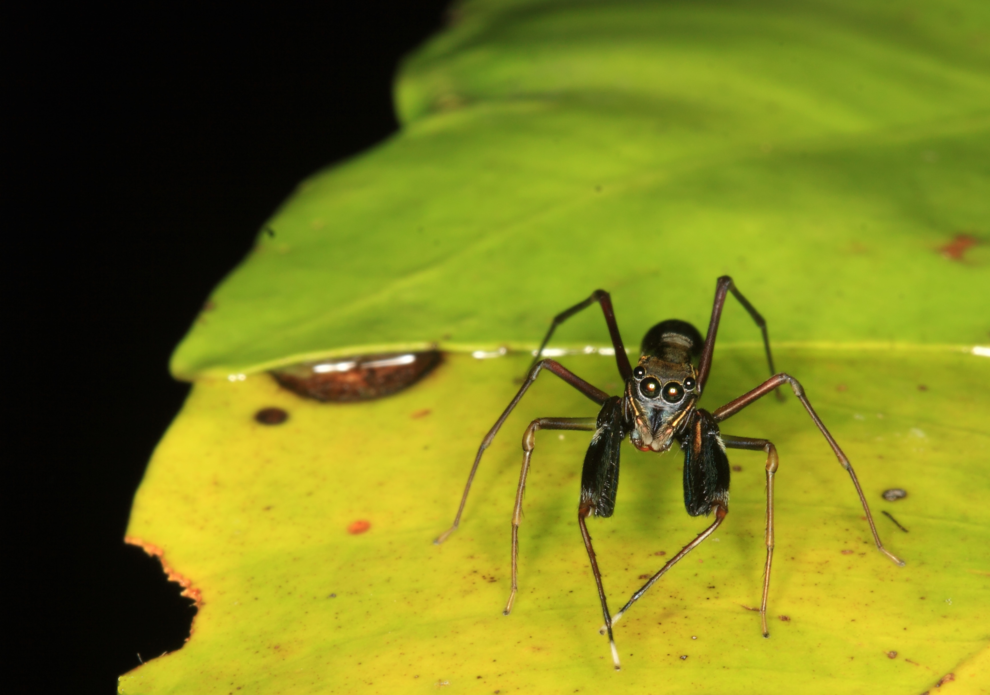 Male Diolenius phrynoides jumping spider Indonesia, West Papua, Sorong, Raja Ampat: Kri Island (vic. Pulau Mansur), 60m asl., 30.12.2010